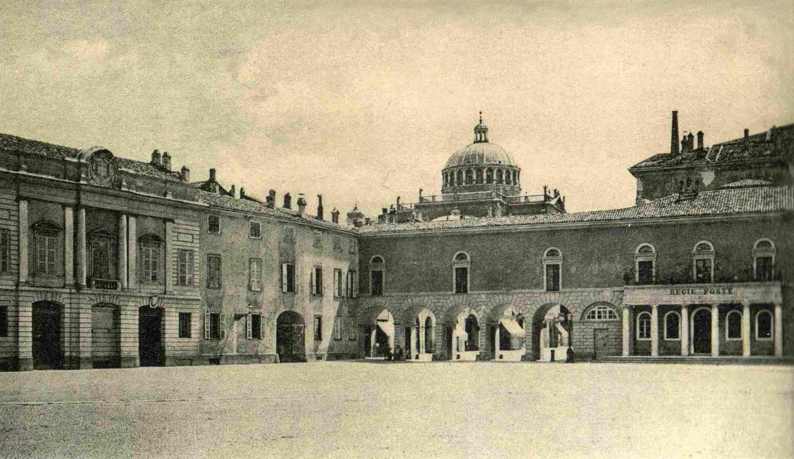 Foto del cavalcavia Ferdinandeo che attraversava l'attuale via Garibaldi a Parma.